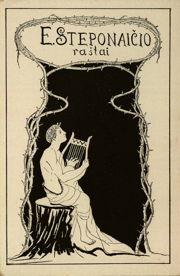 Knygos „E. Steponaičio raštai: pilnas pomirtinis eilių ir prozos rinkinys“ (Kaunas, 1912 m.) titulinis lapas